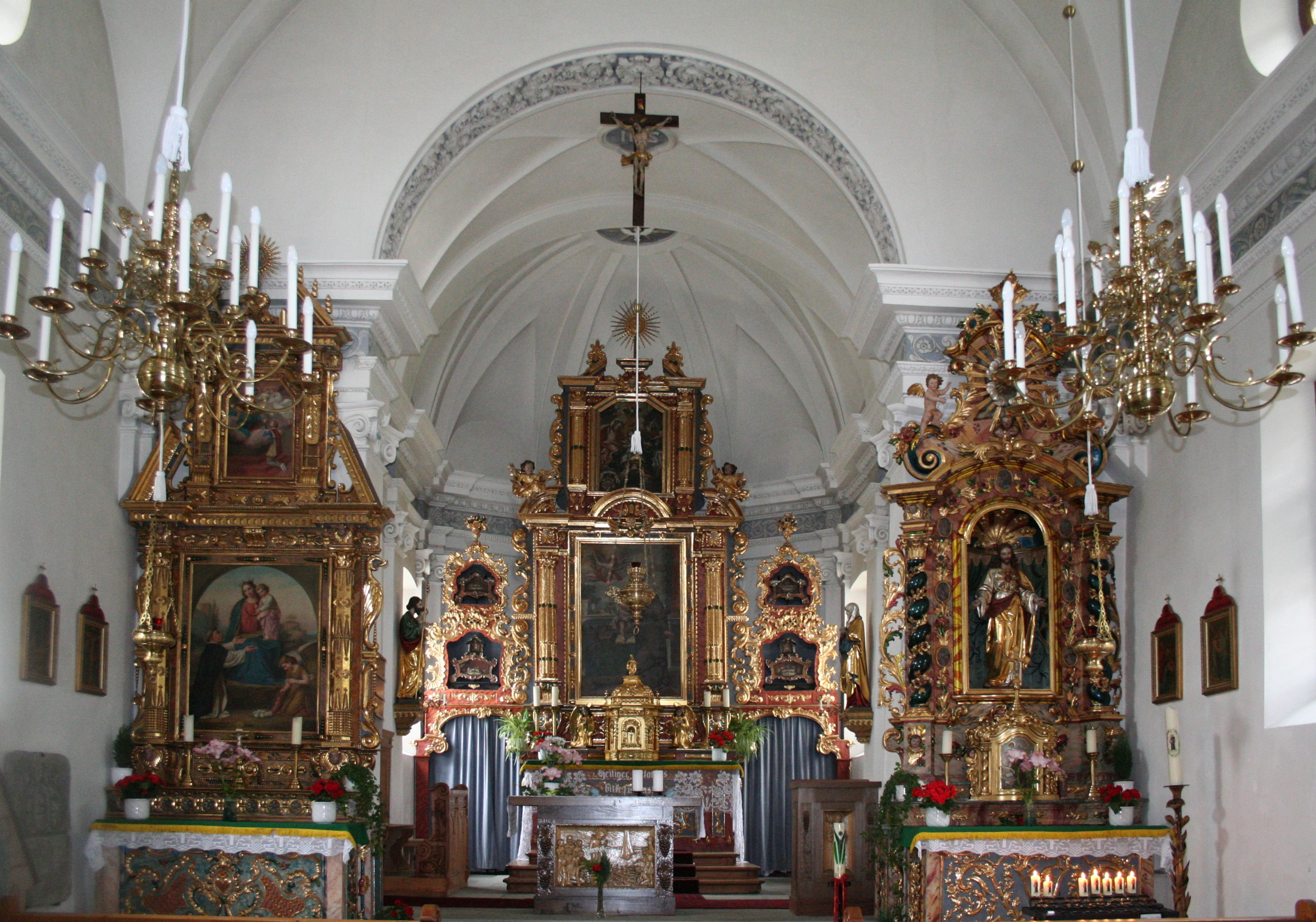 Cavardiras Kirche Innenraum